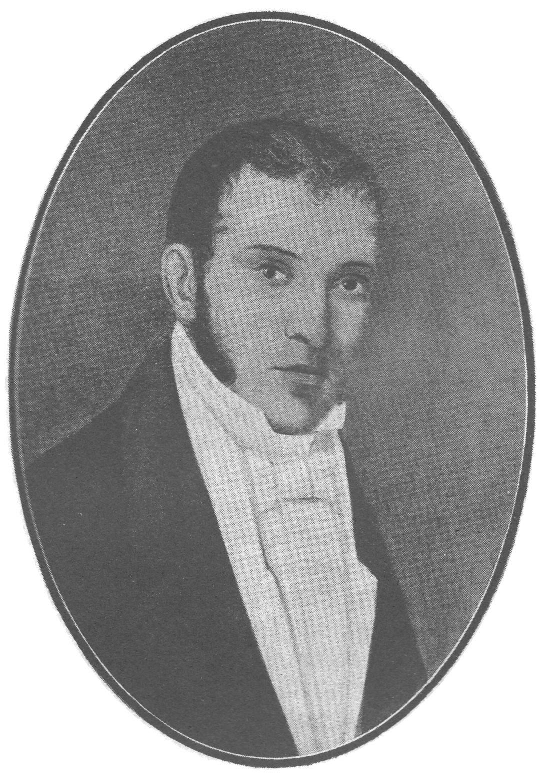 Retrato de Lucas Obes (1782 - 1838), político uruguayo de origen argentino.